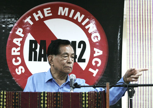 Senator Nene Pimentel